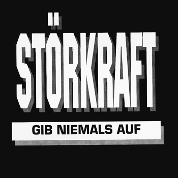 CD-Cover einer Störkraft-Single